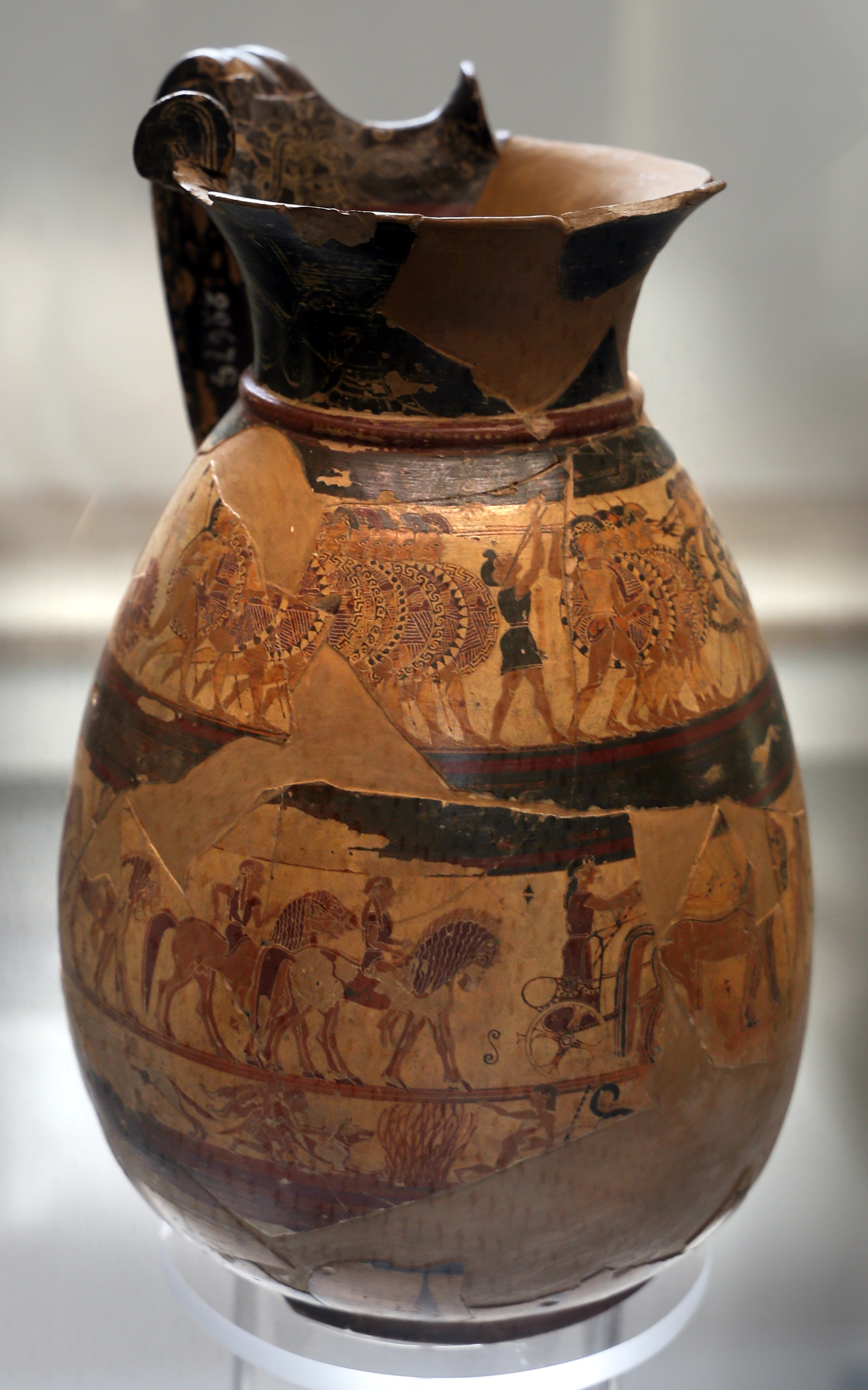 Museo nazionale etrusco di Villa Giulia This is a photo of a monument which is part of cultural heritage of Italy.